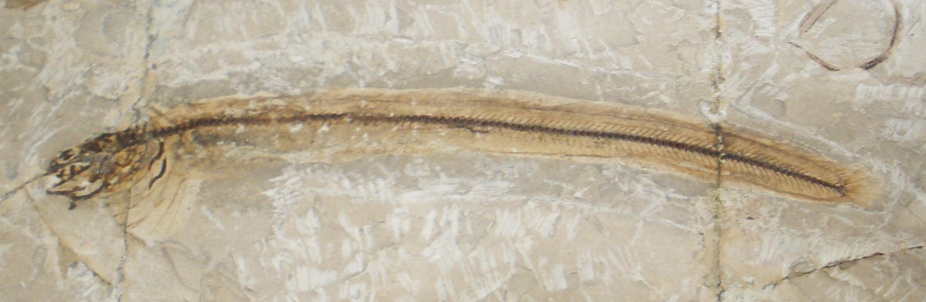 Fossil of Veronanguilla, an extinct fish - Took the photo at Museo di Storia Naturale di Milano